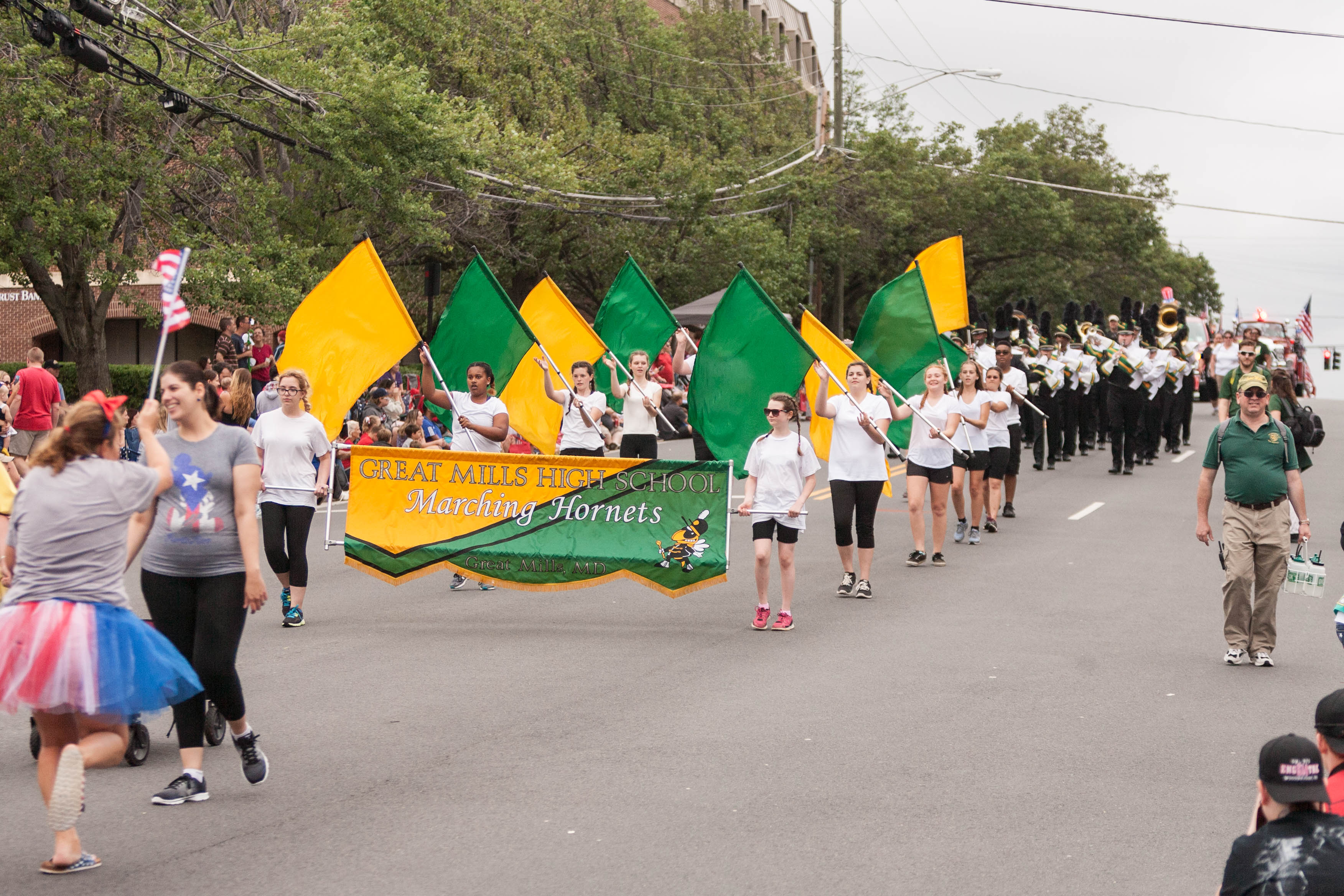 QD3J0204.jpg